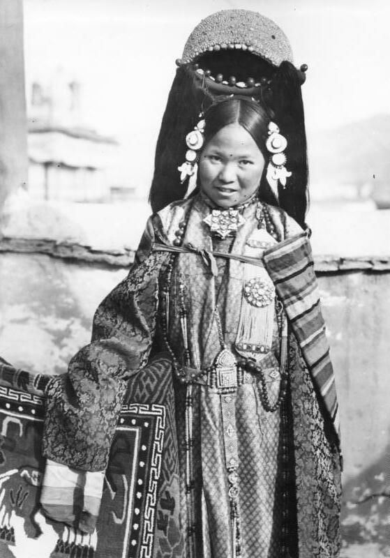 Tibetexpedition, Tibetische Dienerin Lhasa, Dienerin des Mr. Pala [Phala] in Festtracht [Perlenhaube]